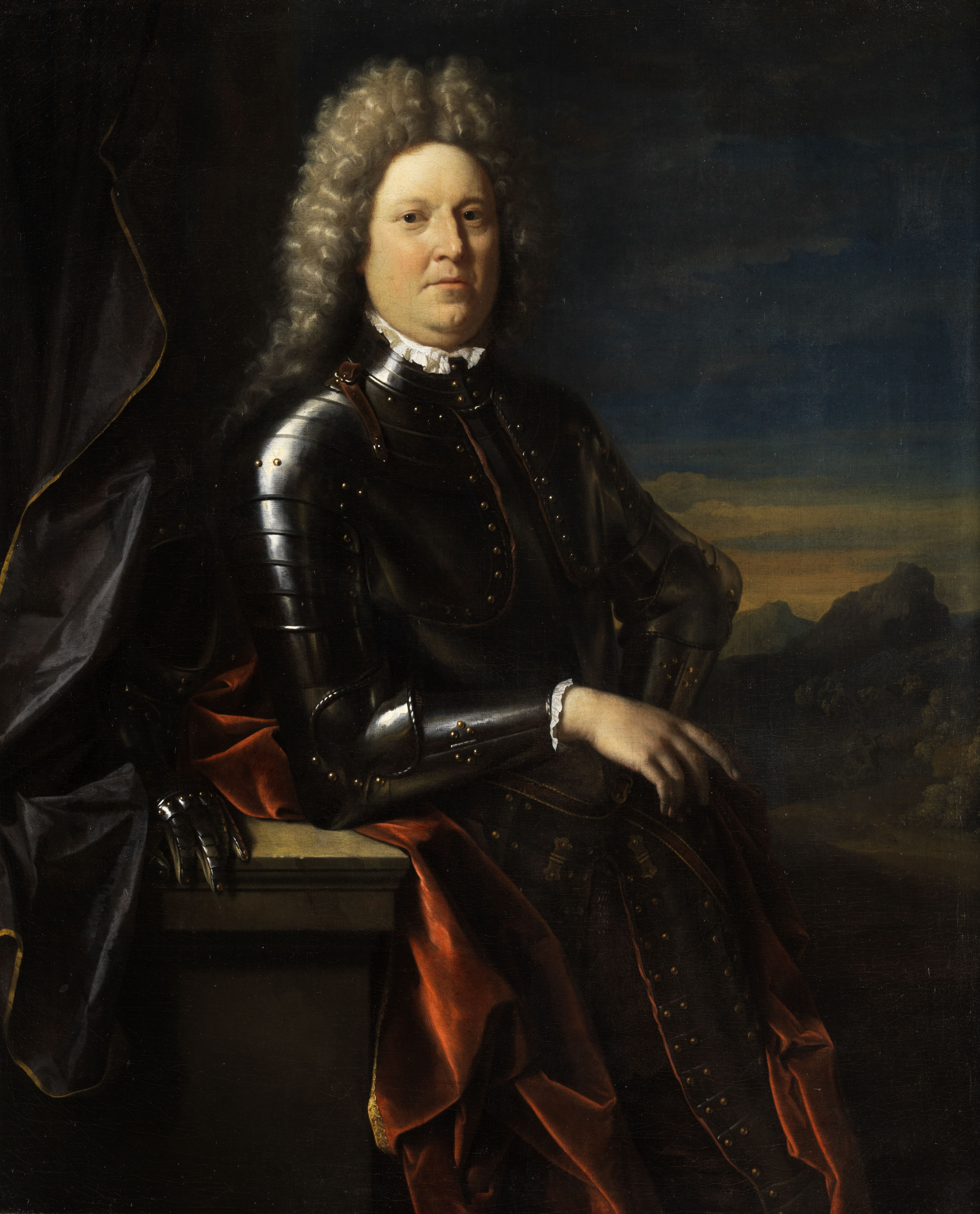 Portrait Friedrich von Schomberg/Schönberg (1615–1690) Aufkleber der Royal Academy mit Darstellungsbezeichnung "Portrait of . the Duke of Schomberg".